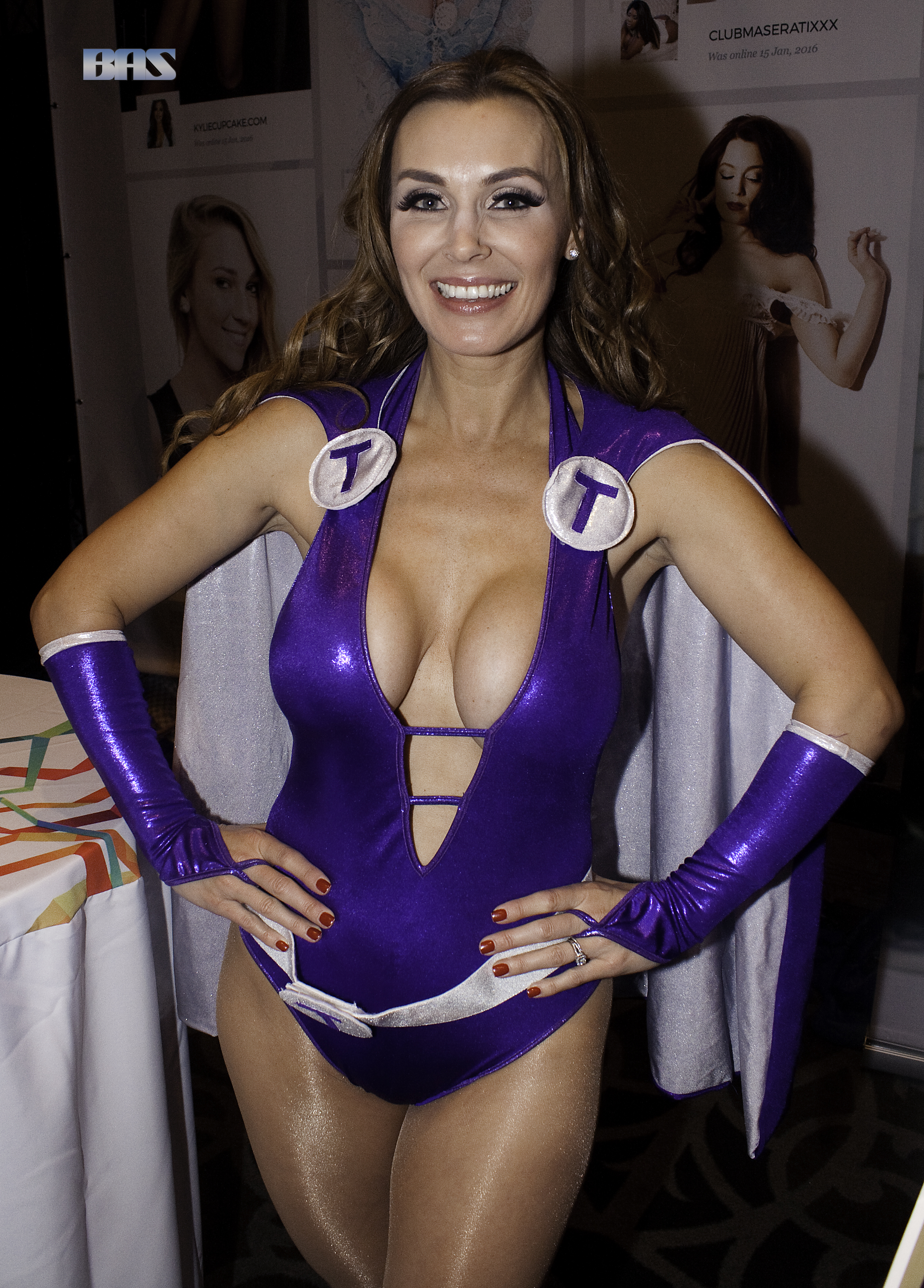 AEE16_0310bas